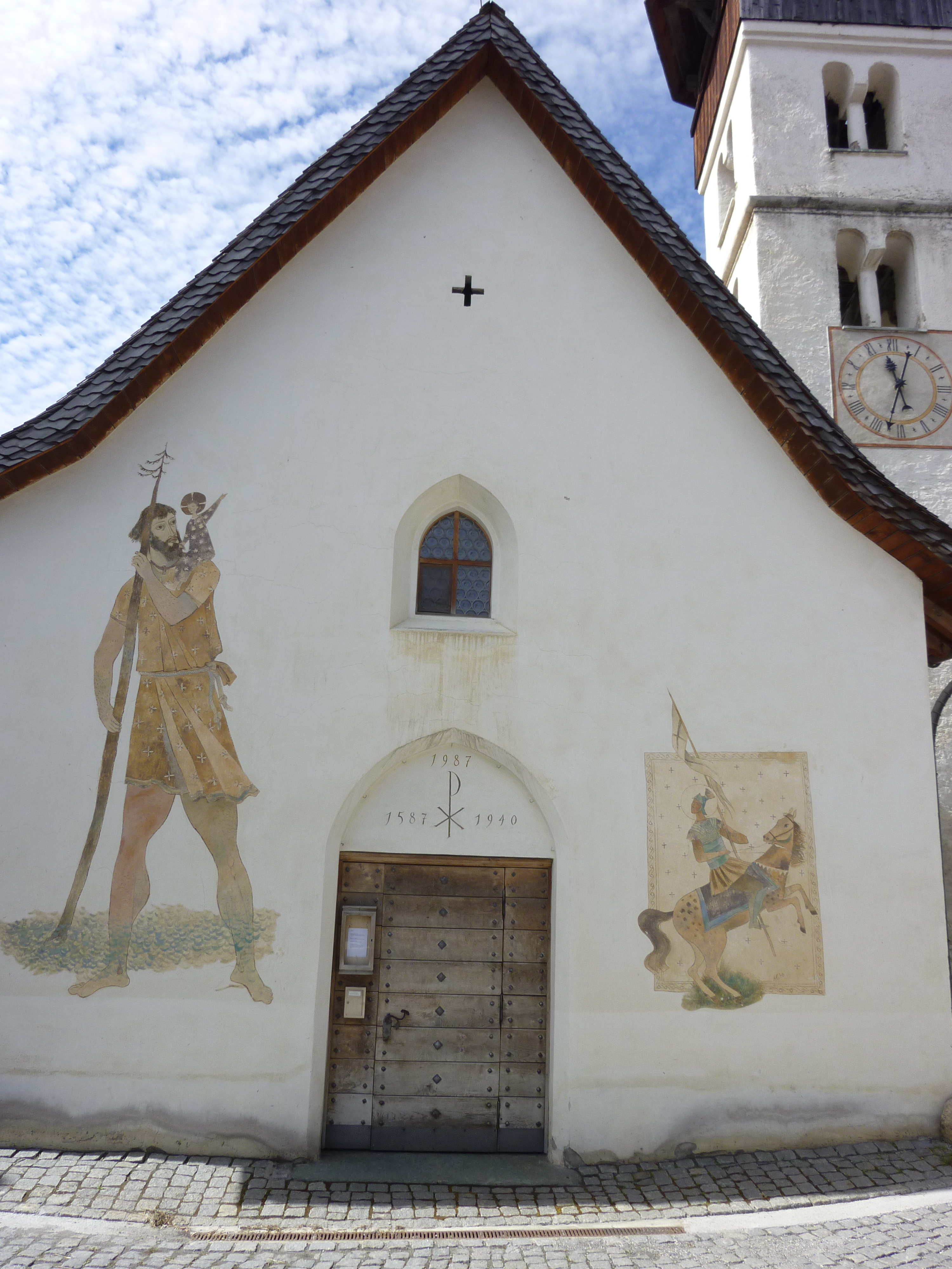 Katholische Kirche Vella, Wandbilder (Christophorus und Mauritius) von Alois Carigiet